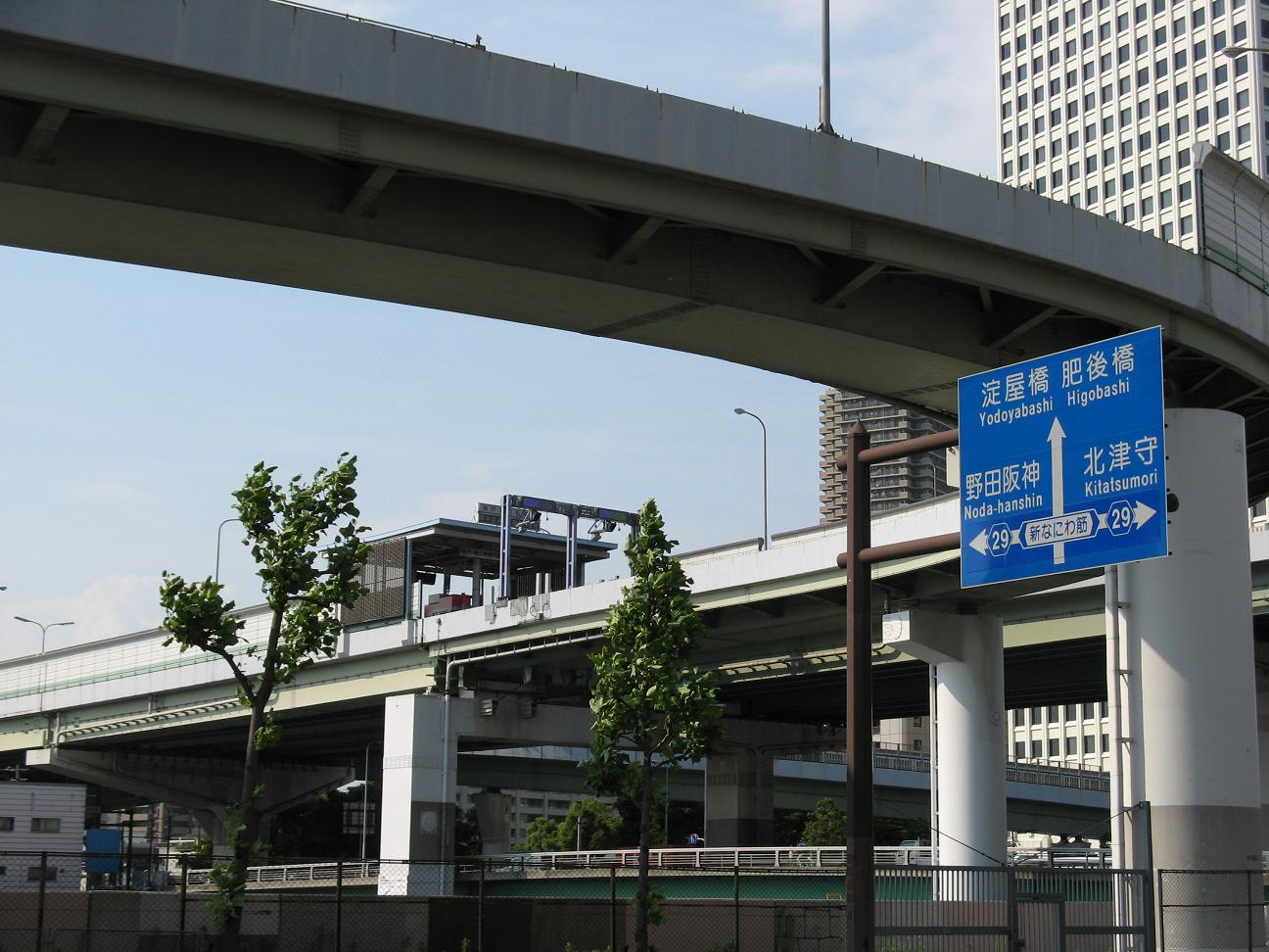 阪神高速中之島西出入口 昭和橋東詰から北東望